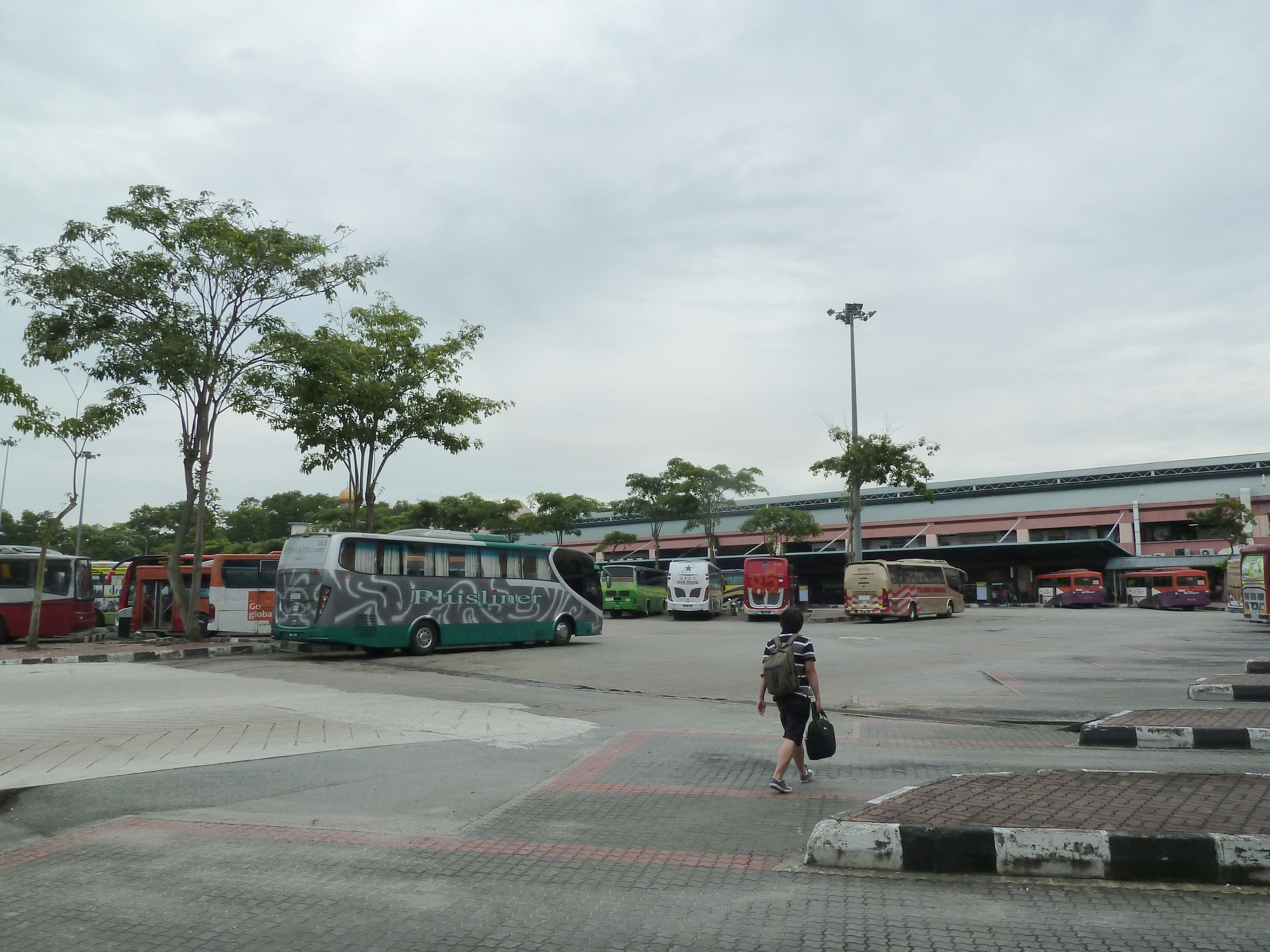 ジョホールバル郊外にあるラーキン・バスターミナル